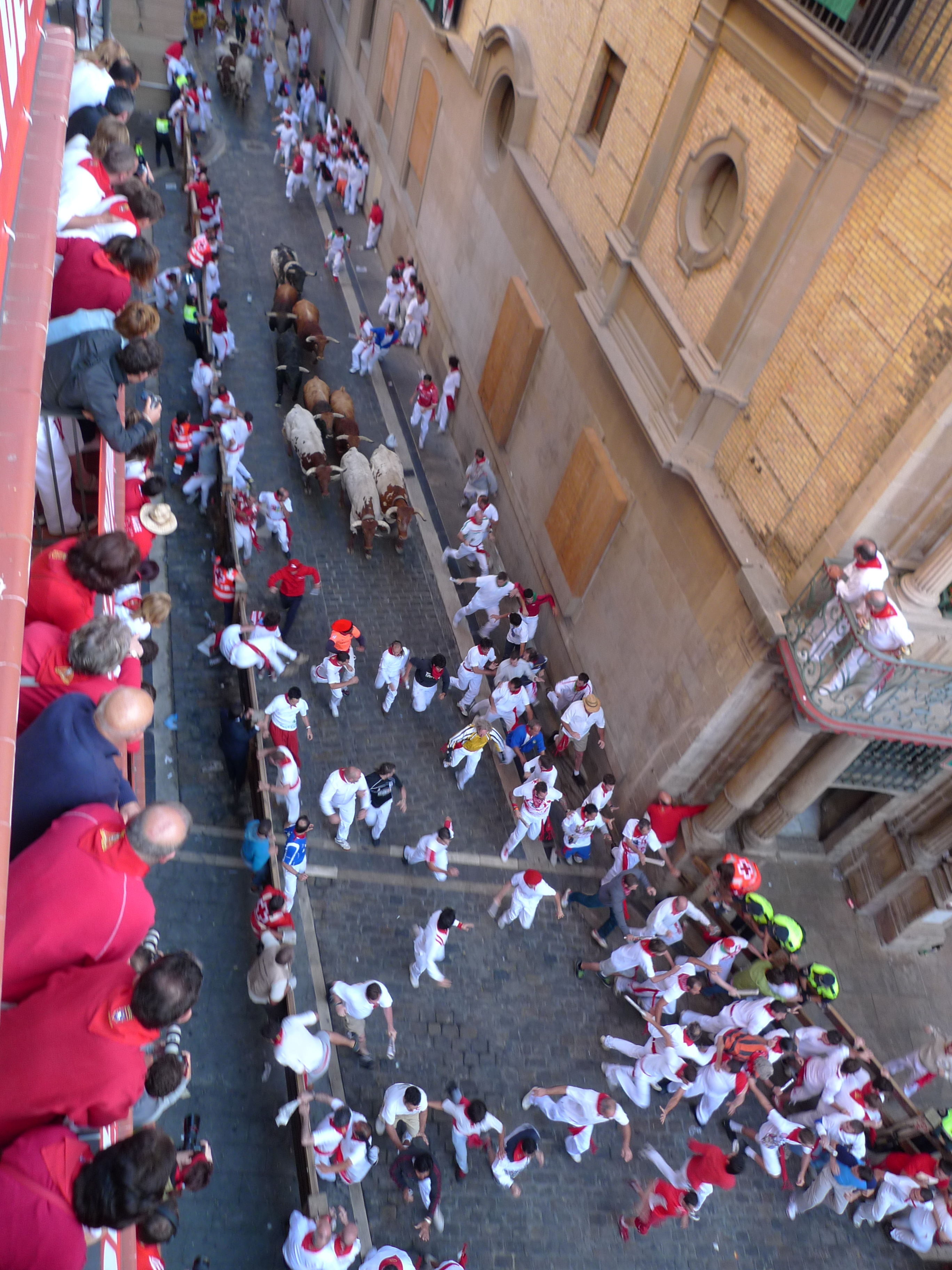 sanfermin 2009, pamplona, spain